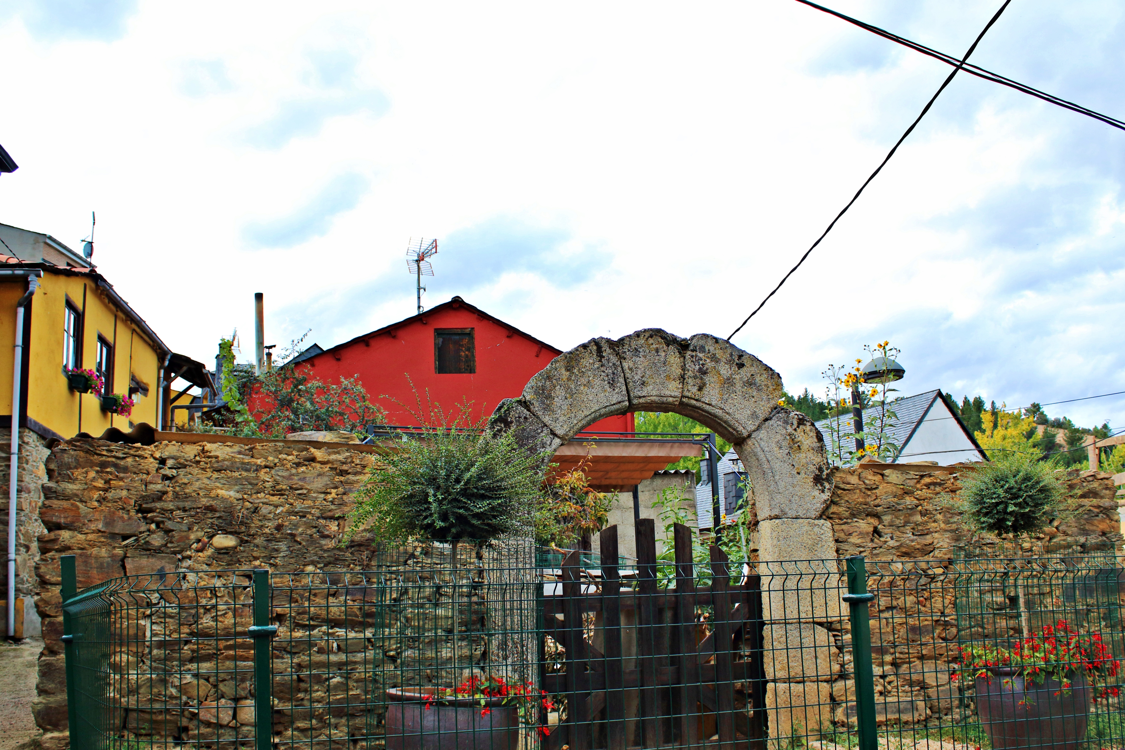 Localidad de Otero, Ayuntamiento de Ponferrada, comarca de El Bierzo, provincia de León.